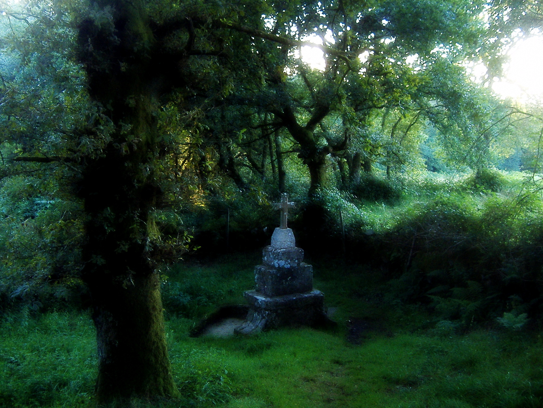 Fonte das Pías, concello de Sobrado.